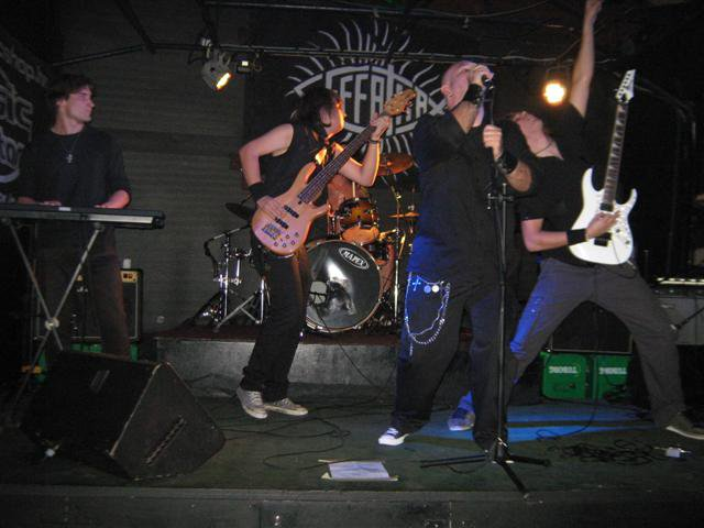 EffaTha, Klub Palach, Rijeka 2011